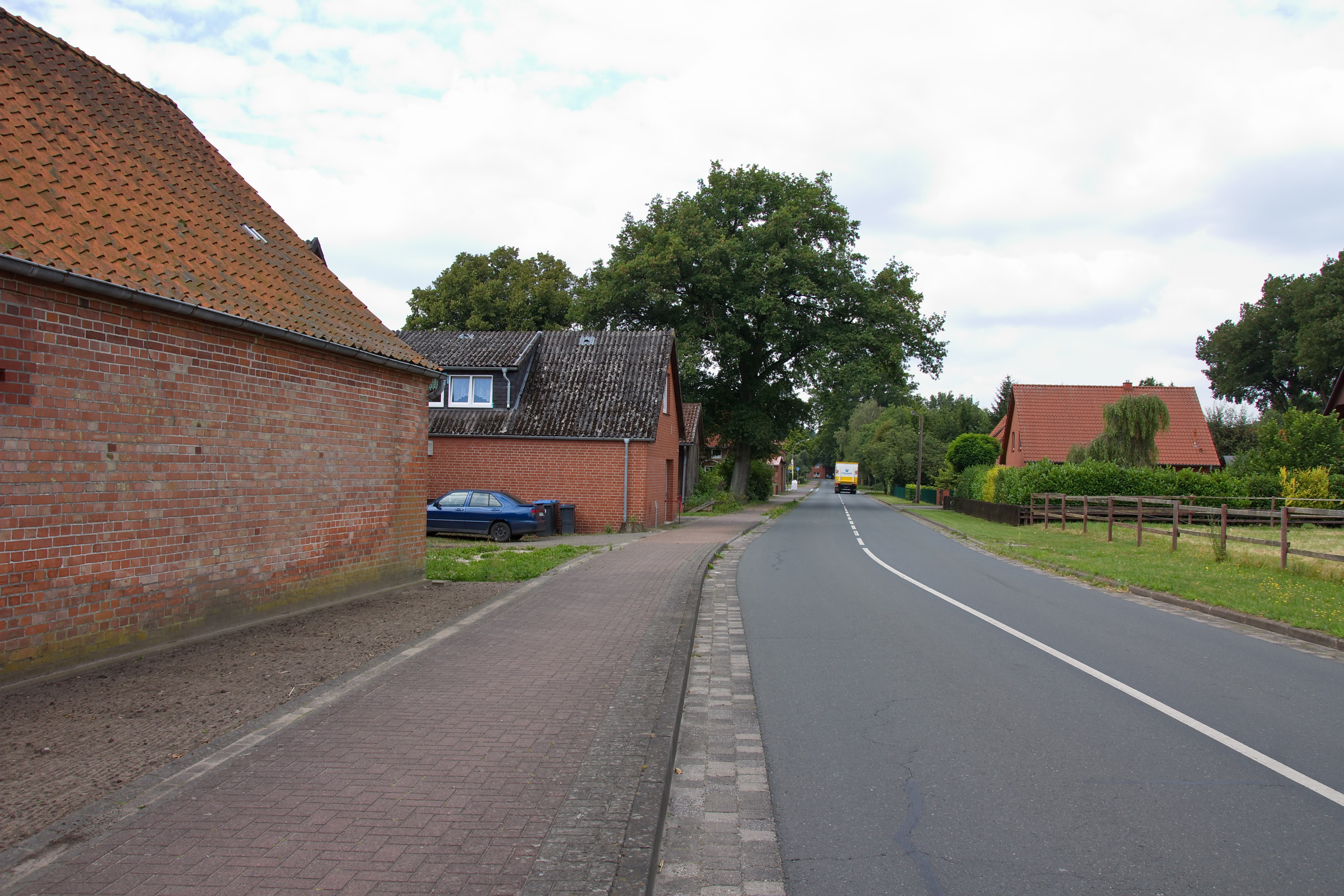 Holtum Gest (Kirchlinteln), Niedersachsen, Deutschland